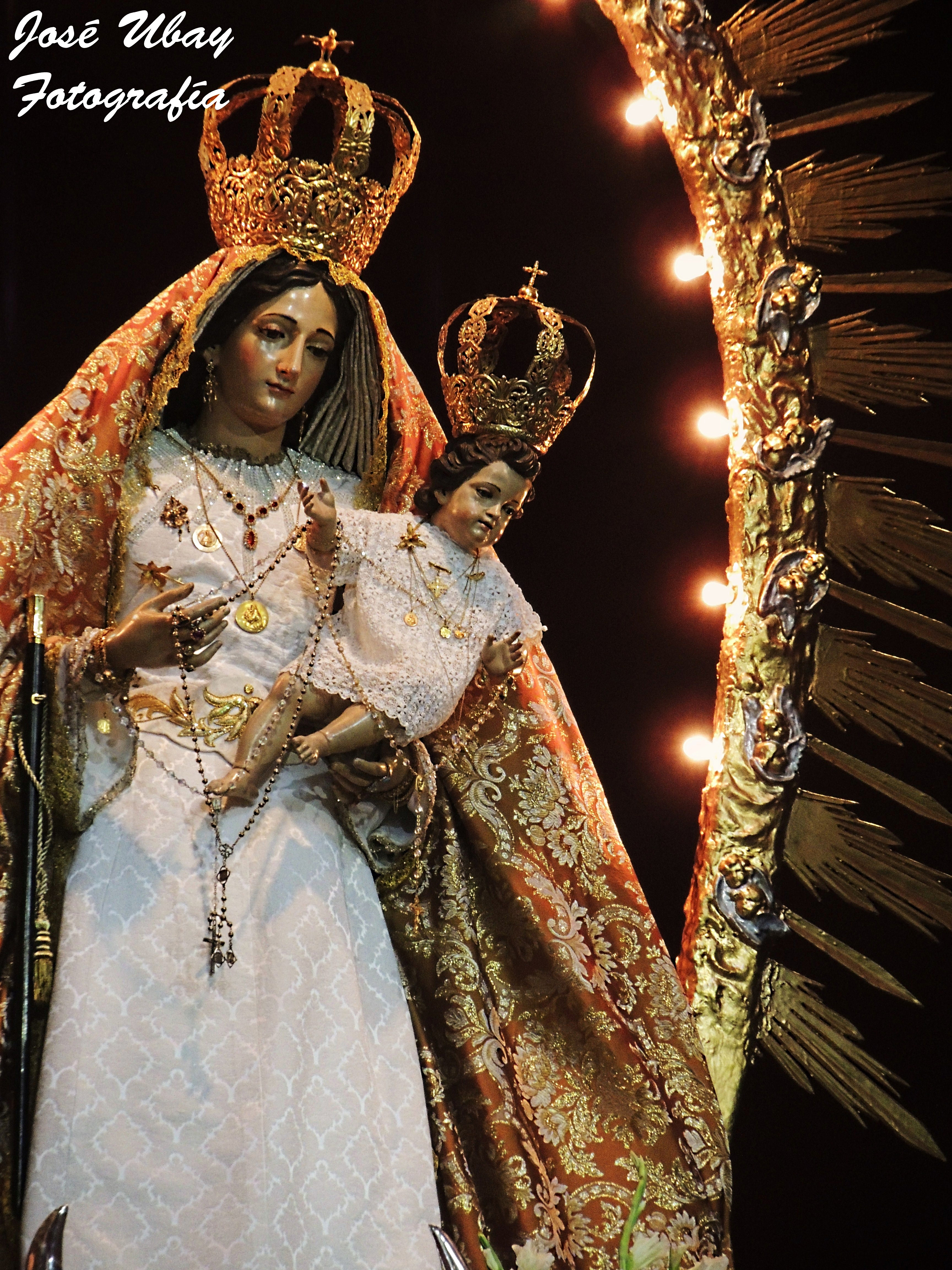 Nuestra Señora del Rosario Coronada. Siglo XVII. Anónimo. Parroquia Matriz de San Sebastián. Villa de Agüimes (Gran Canaria).